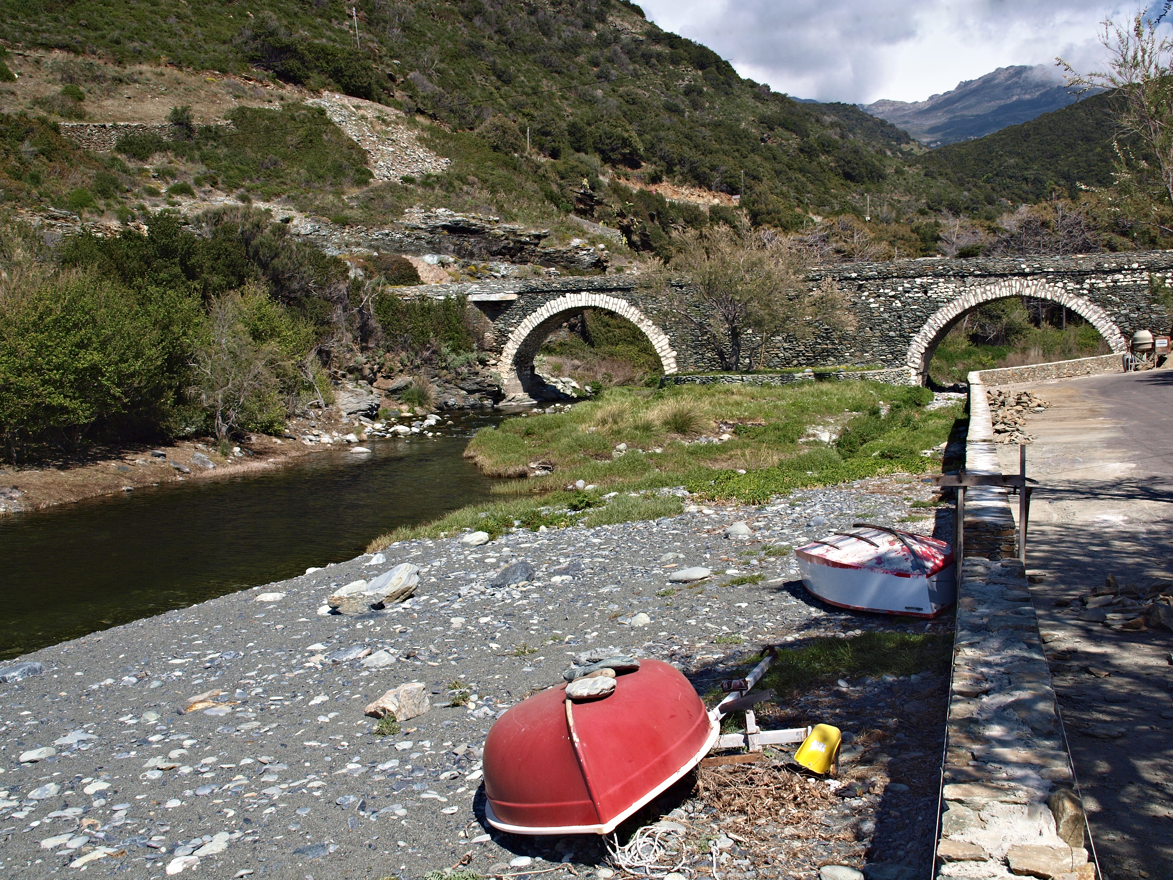 Olmeta-di-Capocorso (Corsica) - Pont sur la rivière Olmeta